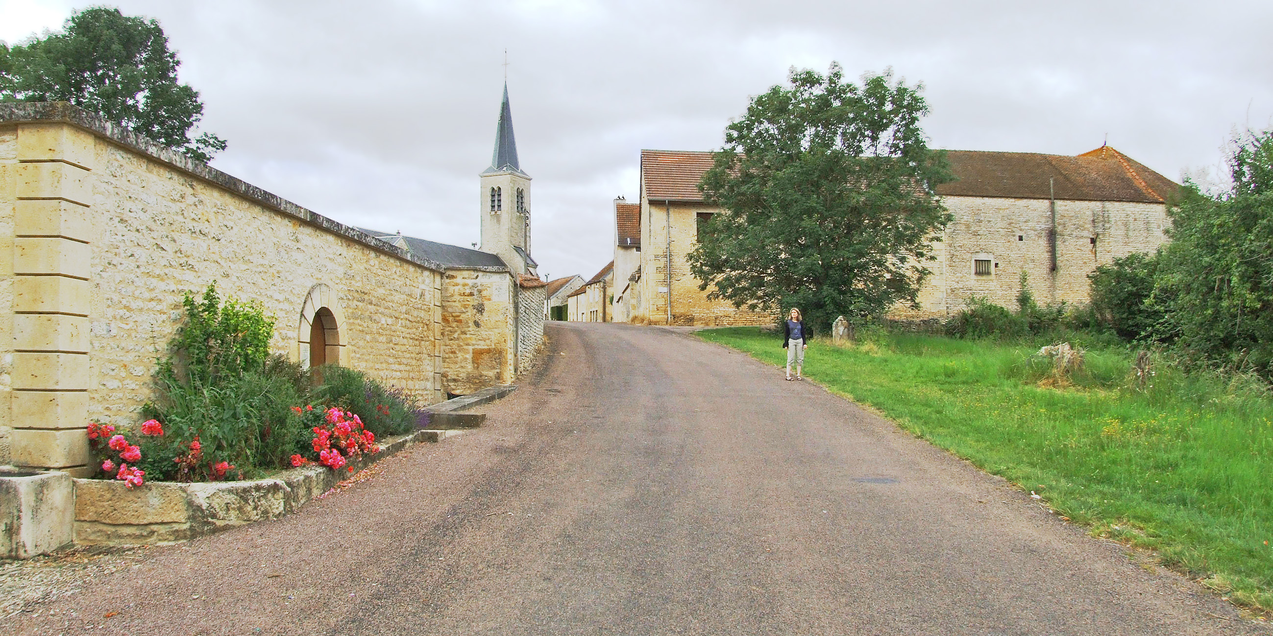 Lavoir de Baigneux-les-Juifs et l'église paroissiale, Côte-d'Or, Bourgogne, FRANCE